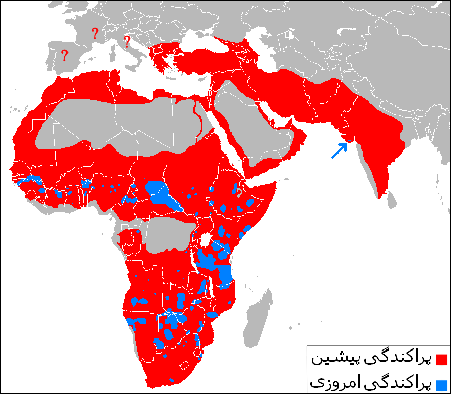 نقشه پراکندگی جمعیت شیرها.